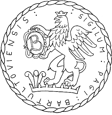 Pečeť obce Bartovice z roku 1734.